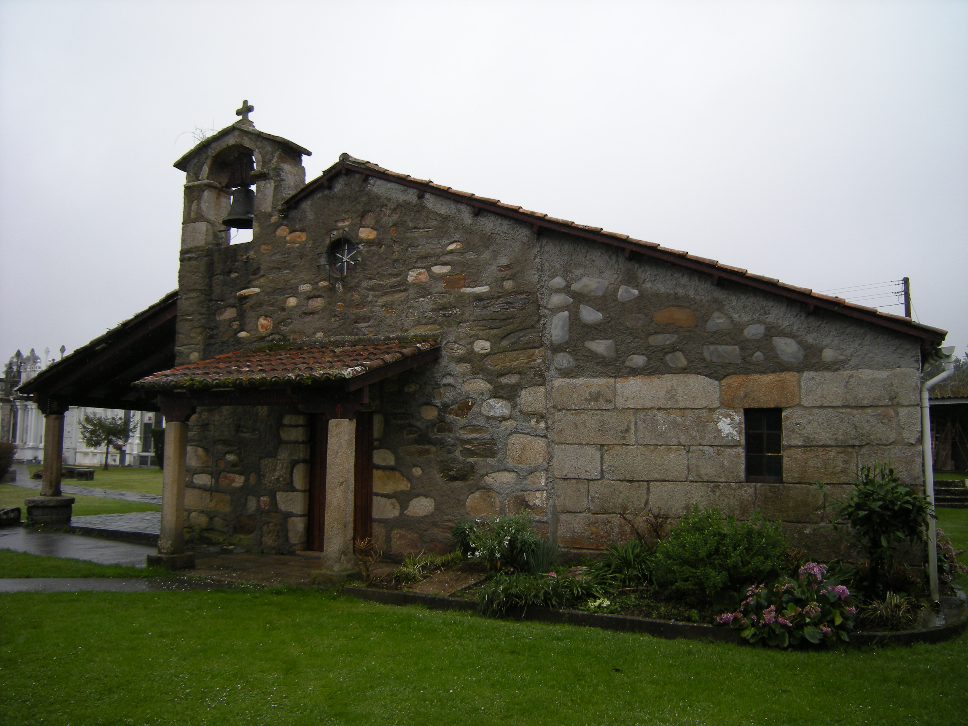 Fue construida en el siglo XII sobre un antiguo templo prerrománico anterior al siglo X, del que solamente conserva algunos vestigios arqueológicos reutilizados en su interior. En el año 1978, se realiza una nueva reforma adosando una nave al muro sur y una galería porticada en el muro norte.